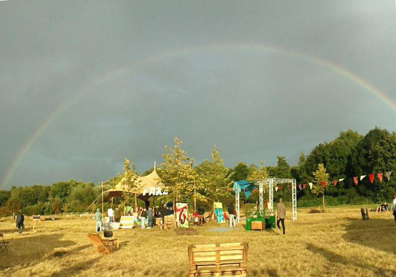 Lazaruswiese im Landschaftspark Mühlenhunt in Oldenburg (Oldb), Gelände des Kultur- und Kunstfestes Freifeld»Jurten, 2016